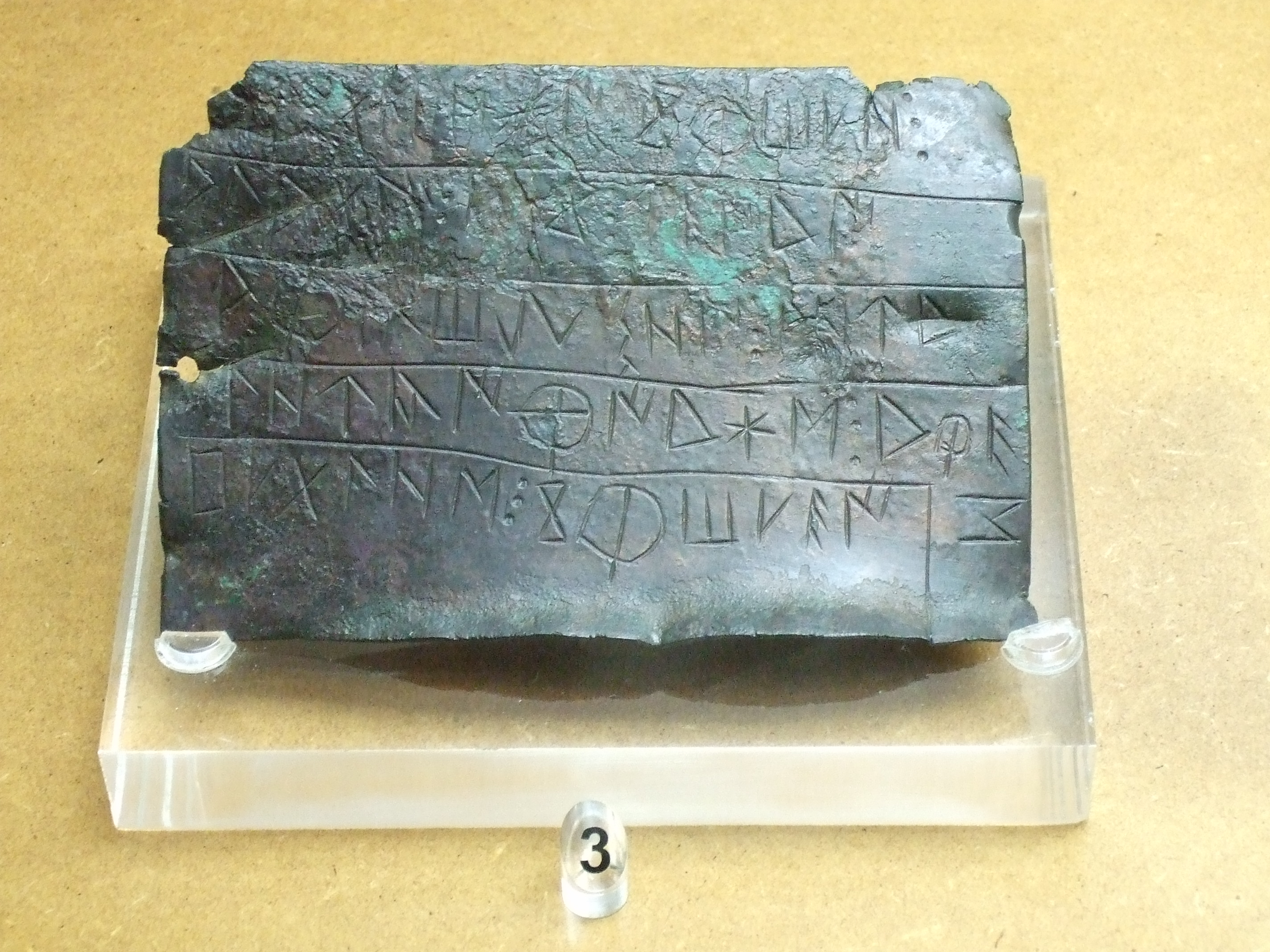 Bronce epigráfico cortonense. Siglo I adC. Límite entre provincias Soria y Zaragoza. Museo de Zaragoza